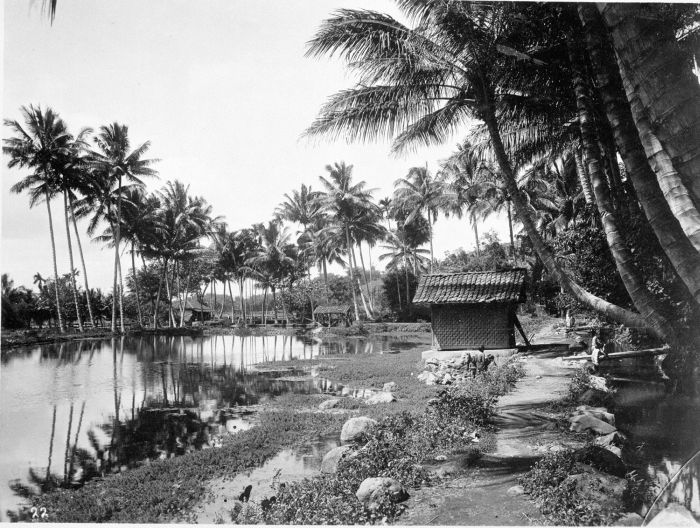 Foto. Meer bij Tjitjappar (Tjipanas?).